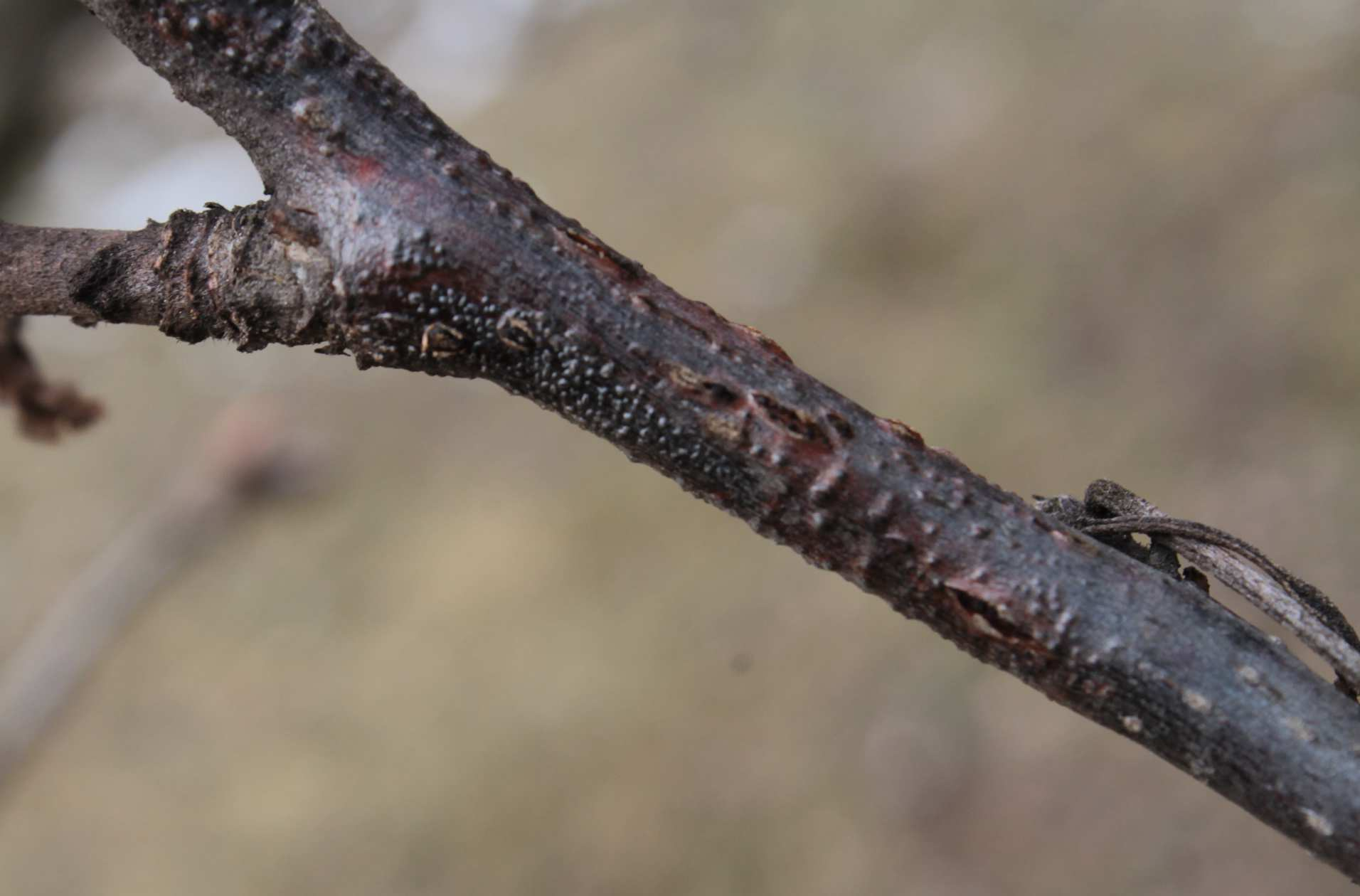 Nektriová rakovina je houbová choroba dřevin způsobená houbou hlívenka buková Nectria galligena, Brno-Komín